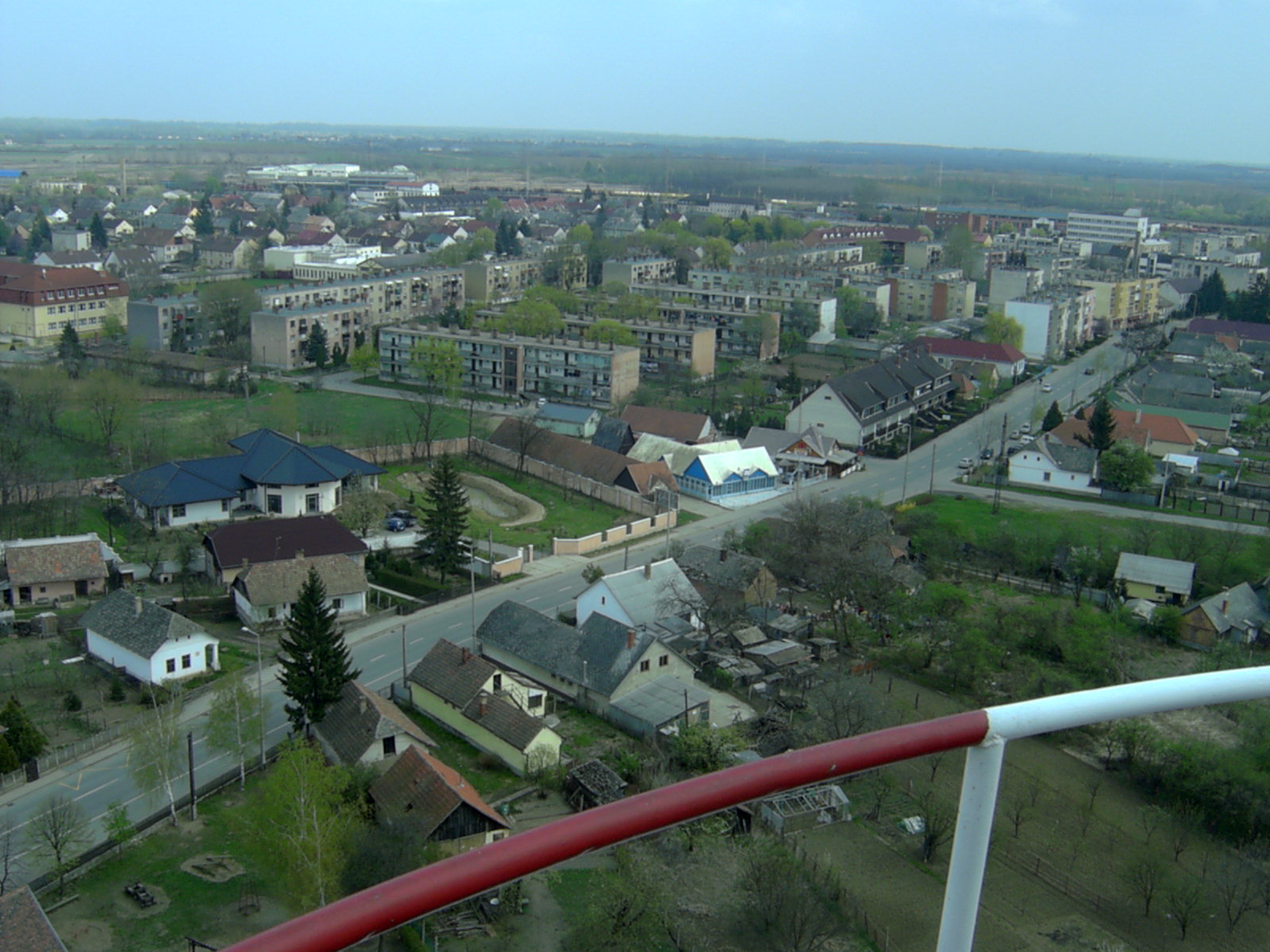 Záhony város madártávlatból.